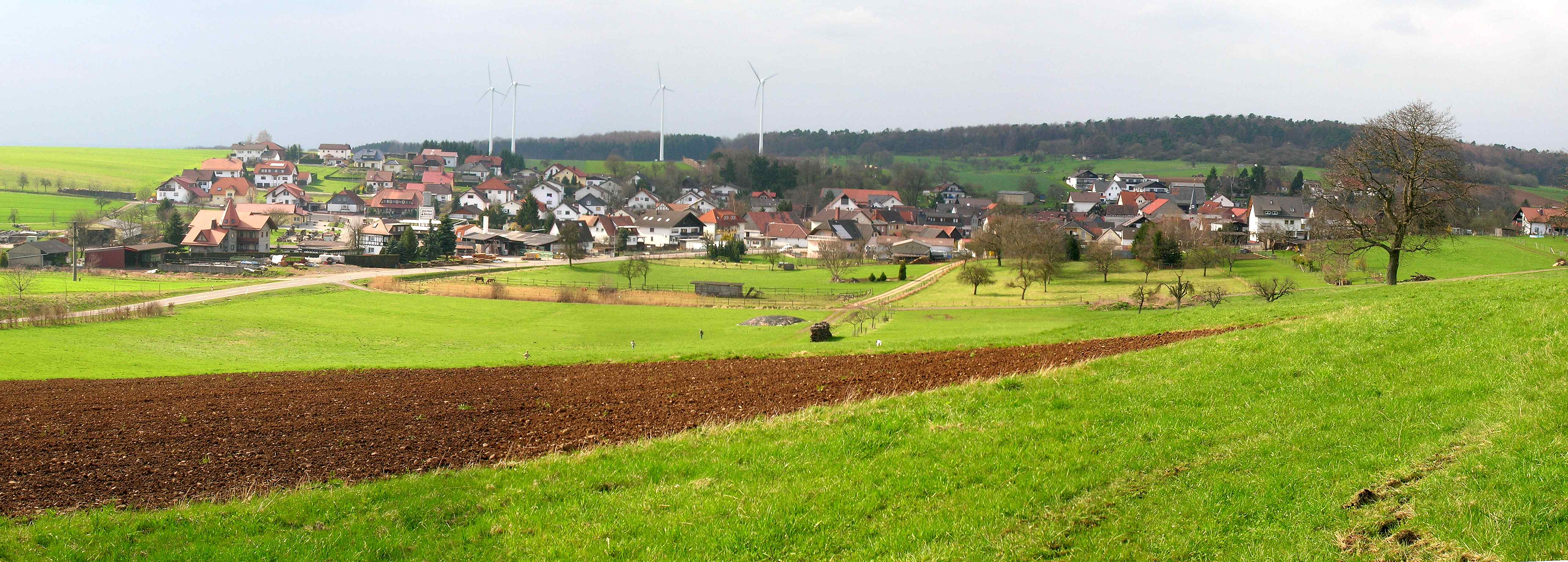 63667 Nidda-Fauerbach, Hessen, Germany Fotograf: K. Seum